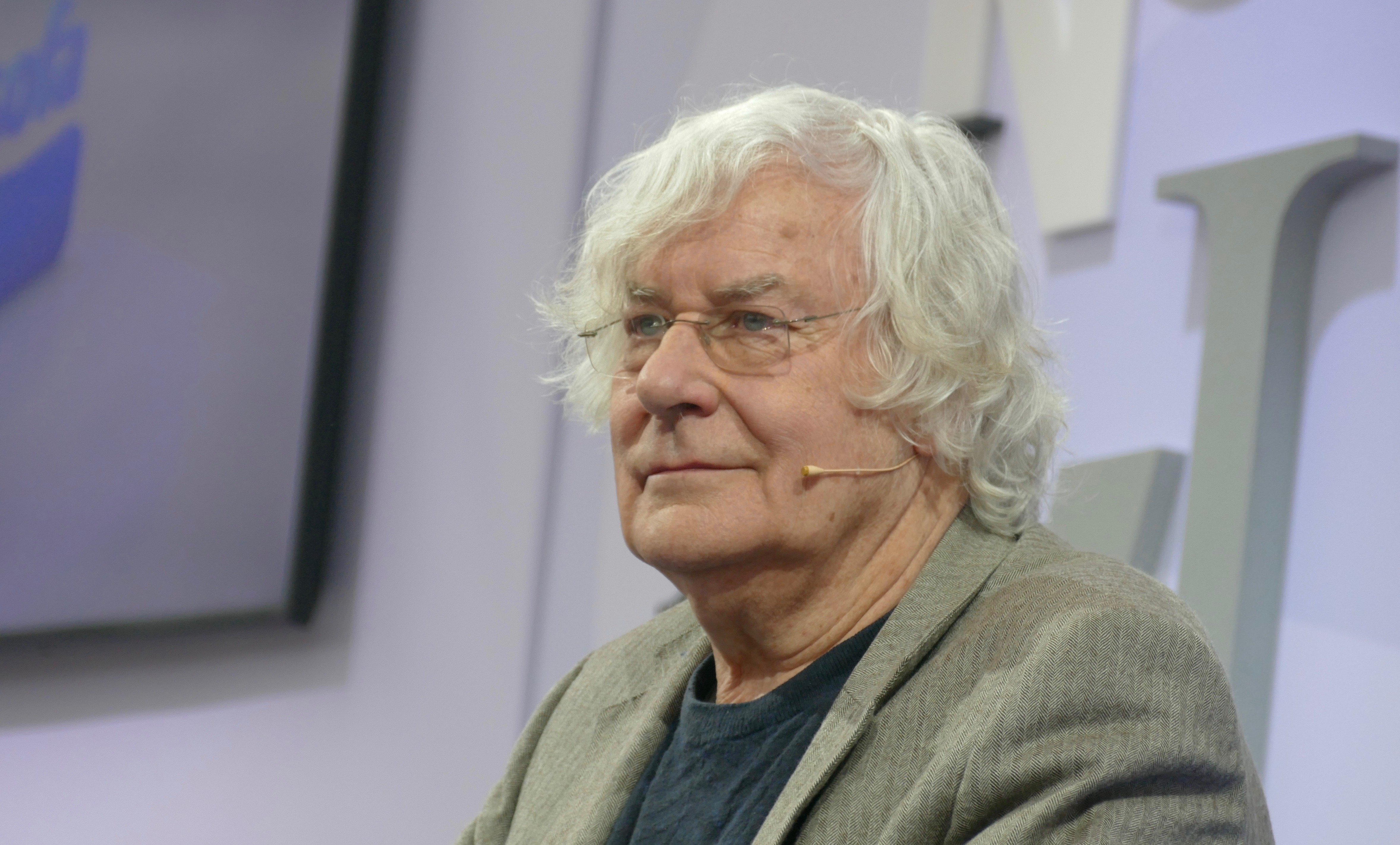 Helmut Lethen stellt auf der Leipziger Buchmesse 2018 sein Buch "Die Staatsräte" vor.